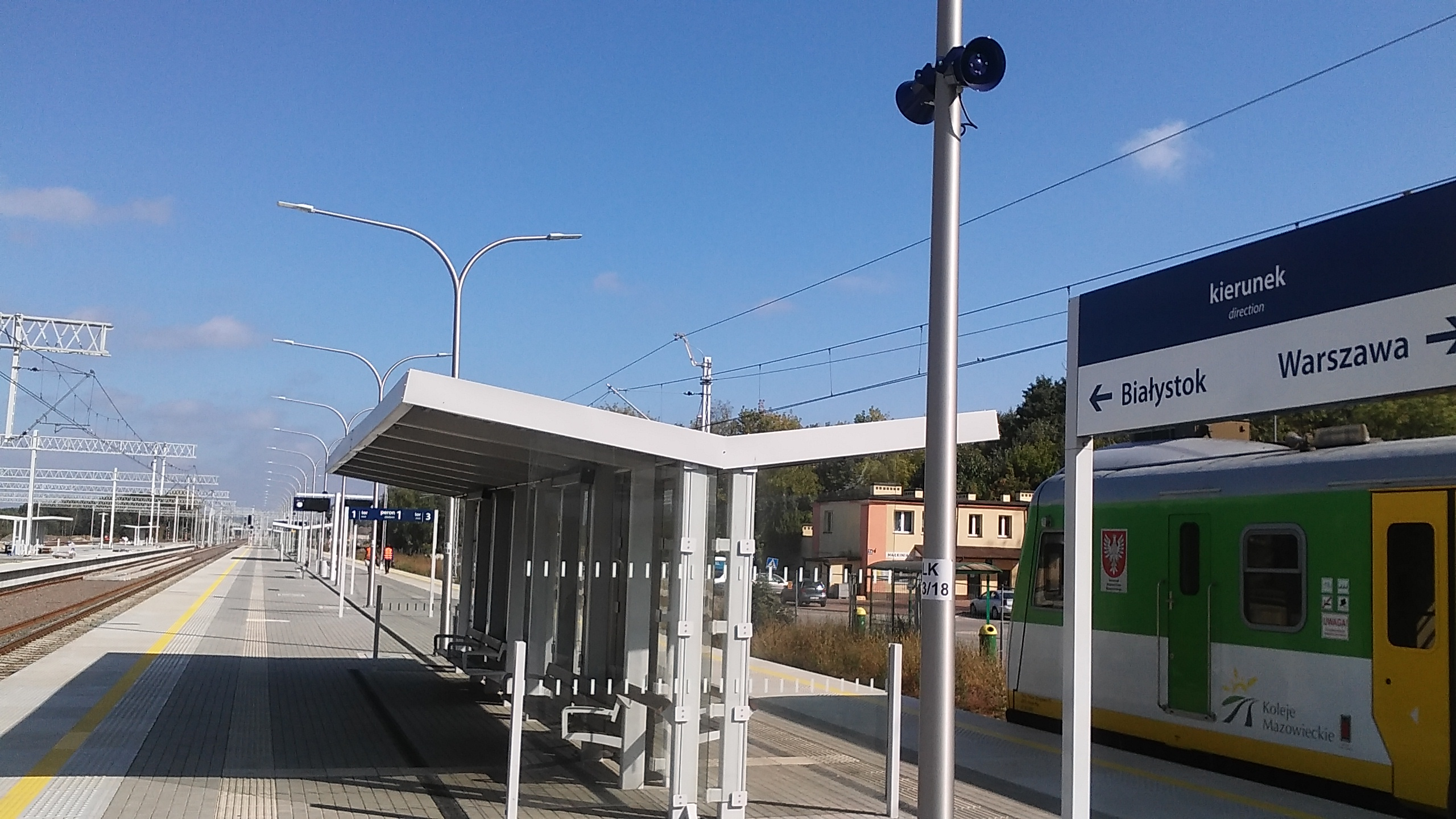 stacja kolejowa Małkinia - zmodernizowany peron 1